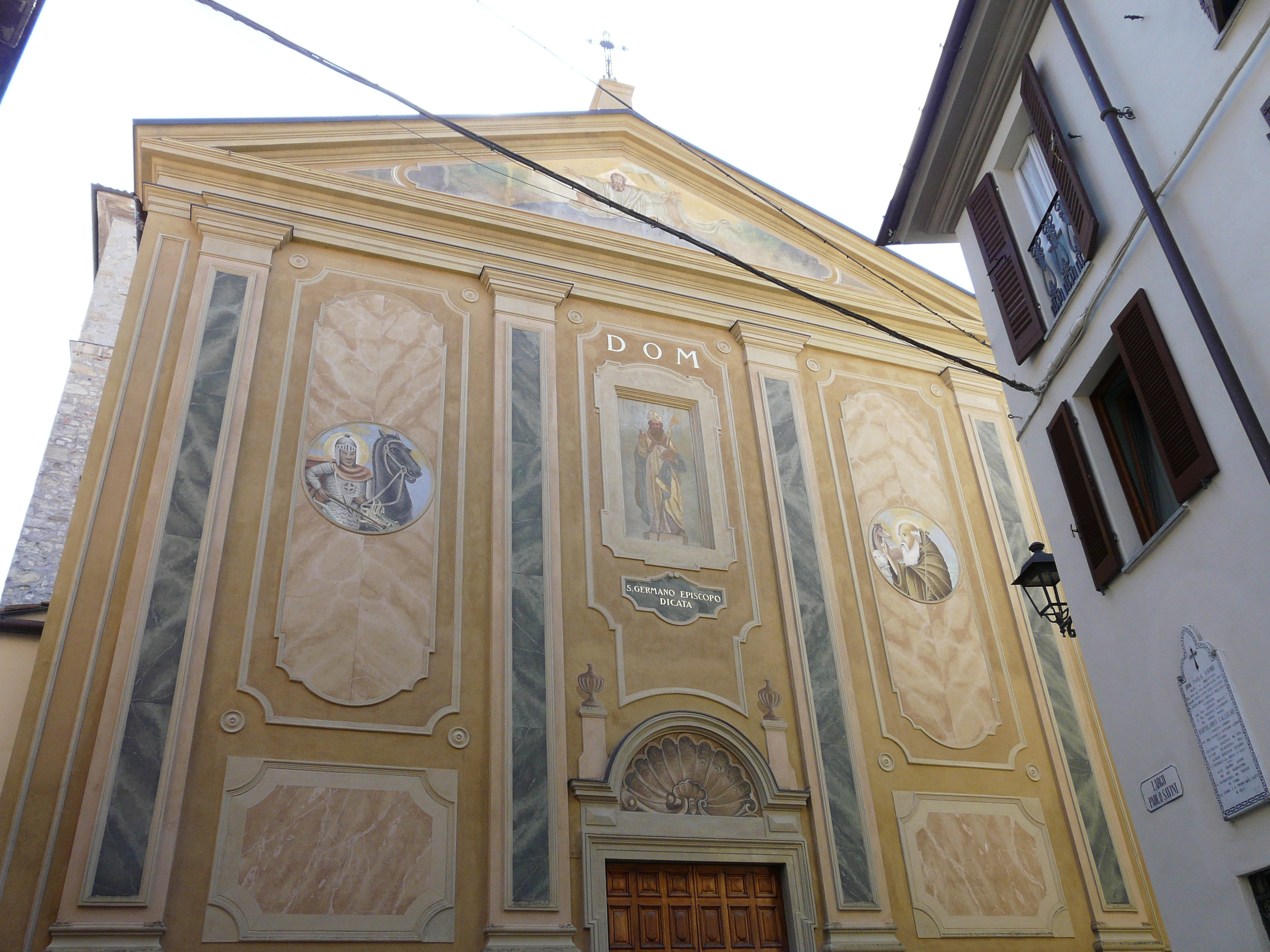 Chiesa di San Germano, Varzi, Lombardia, Italia